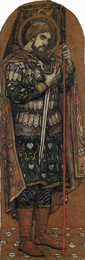 Князь Александр Невский